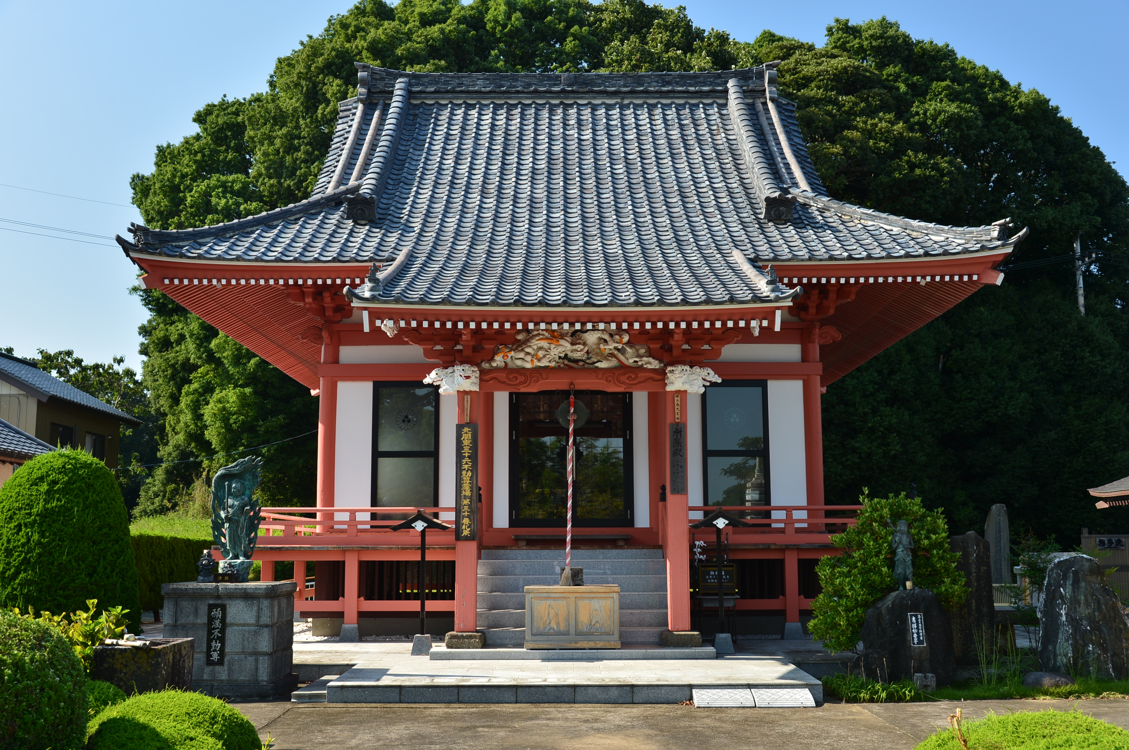 江戸崎不動尊院の祈願殿（茨城県稲敷市）